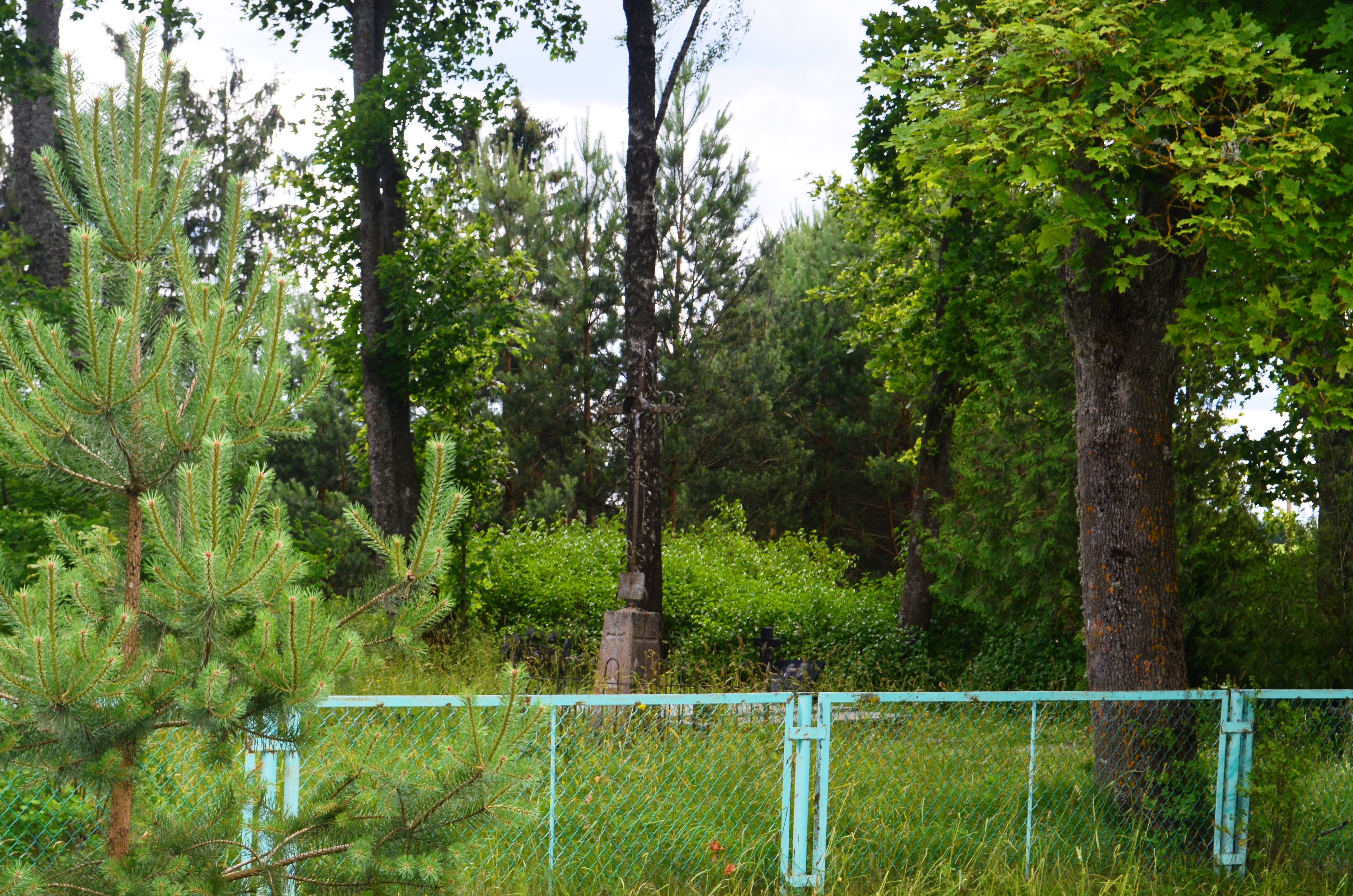 Senkapis (Žvirblio kapinynas), Cigoniškiai, Alytaus raj.